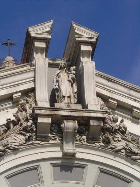 Chiesa di San Lorenzo-Santuario S.S. Maria del Carmine